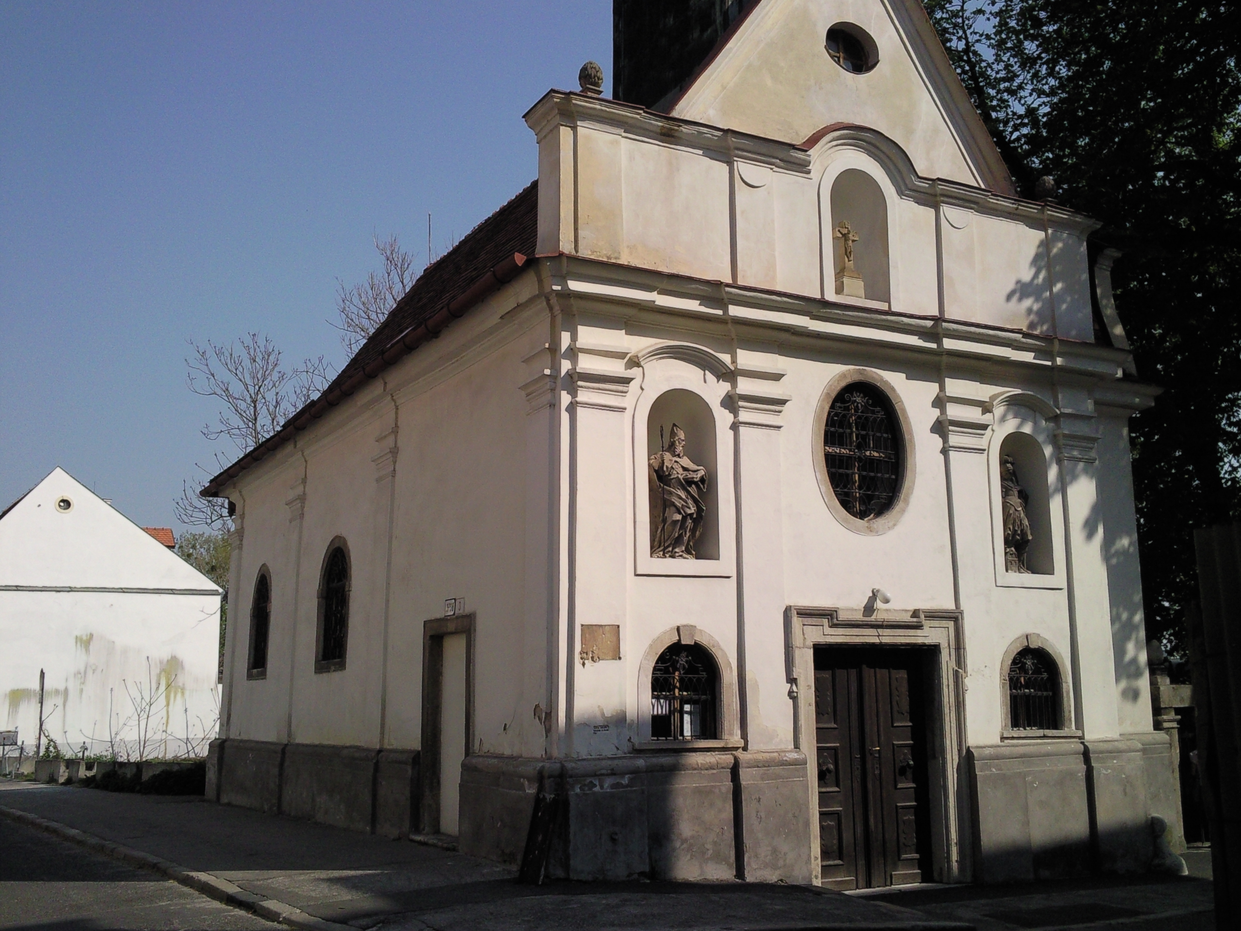 Church under Bratislava Castle